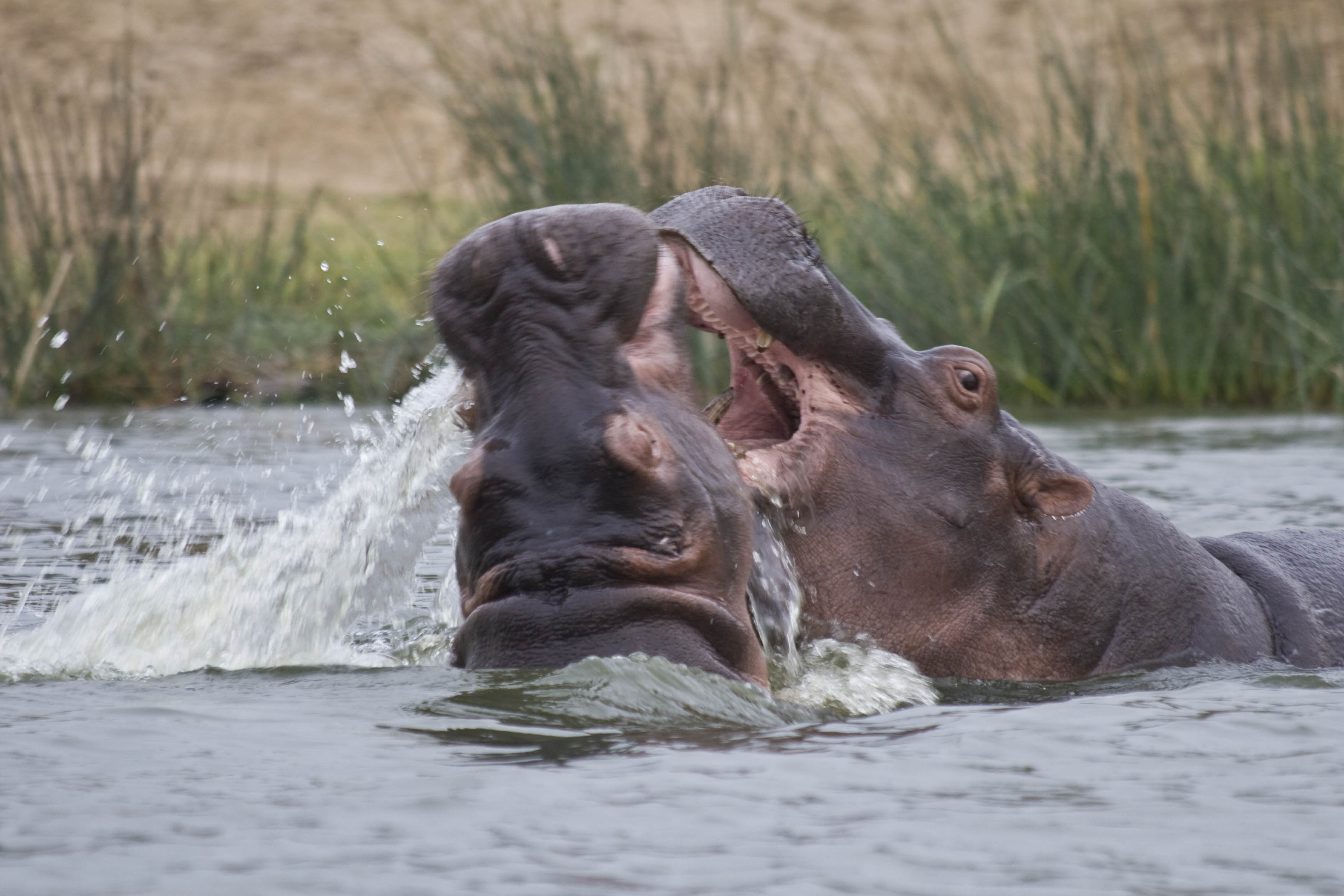 Hippopotamus (Hippopotamus amphibius), Uganda